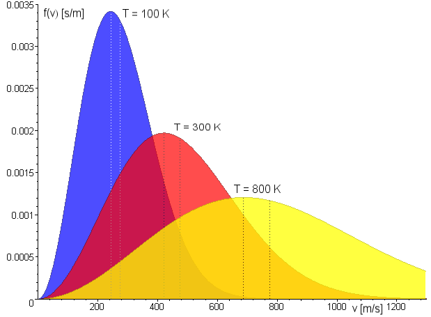 In diesem Diagramm ist die Maxwell-Boltzmannsche Geschwindigkeitsverteilung für Stickstoff (N2) bei drei verschiedenen Temperaturen angegeben. Es ist auch die wahrscheinlichste Geschwindigkeit v w {\displaystyle v_{w und die mittlere Geschwindigkeit v ¯ {\displaystyle {\overline {v } eingezeichnet. Dabei gilt immer dass die wahrscheinlichste Geschwindigkeit kleiner als die mittlere Geschwindigkeit ist.